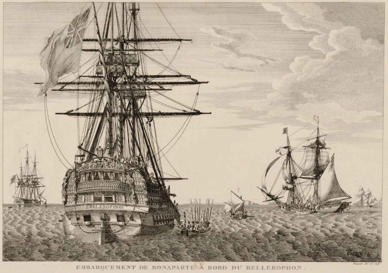 Napoléon s'embarquant sur un vaisseau anglais à l'île d'Aix (près de Rochefort) après sa défaite et son abdication. Juillet 1815. Estampe gravée par Jean-Jérôme Baugean. Taille du dessin : 348 x 457 mm.